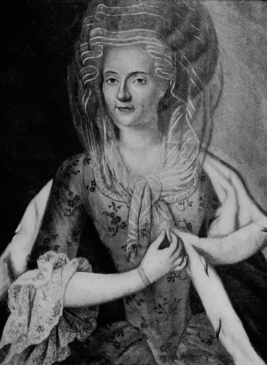 Portrait of Anna Canalis di Cumiana, Marchesa di Spigno (1680-1769)